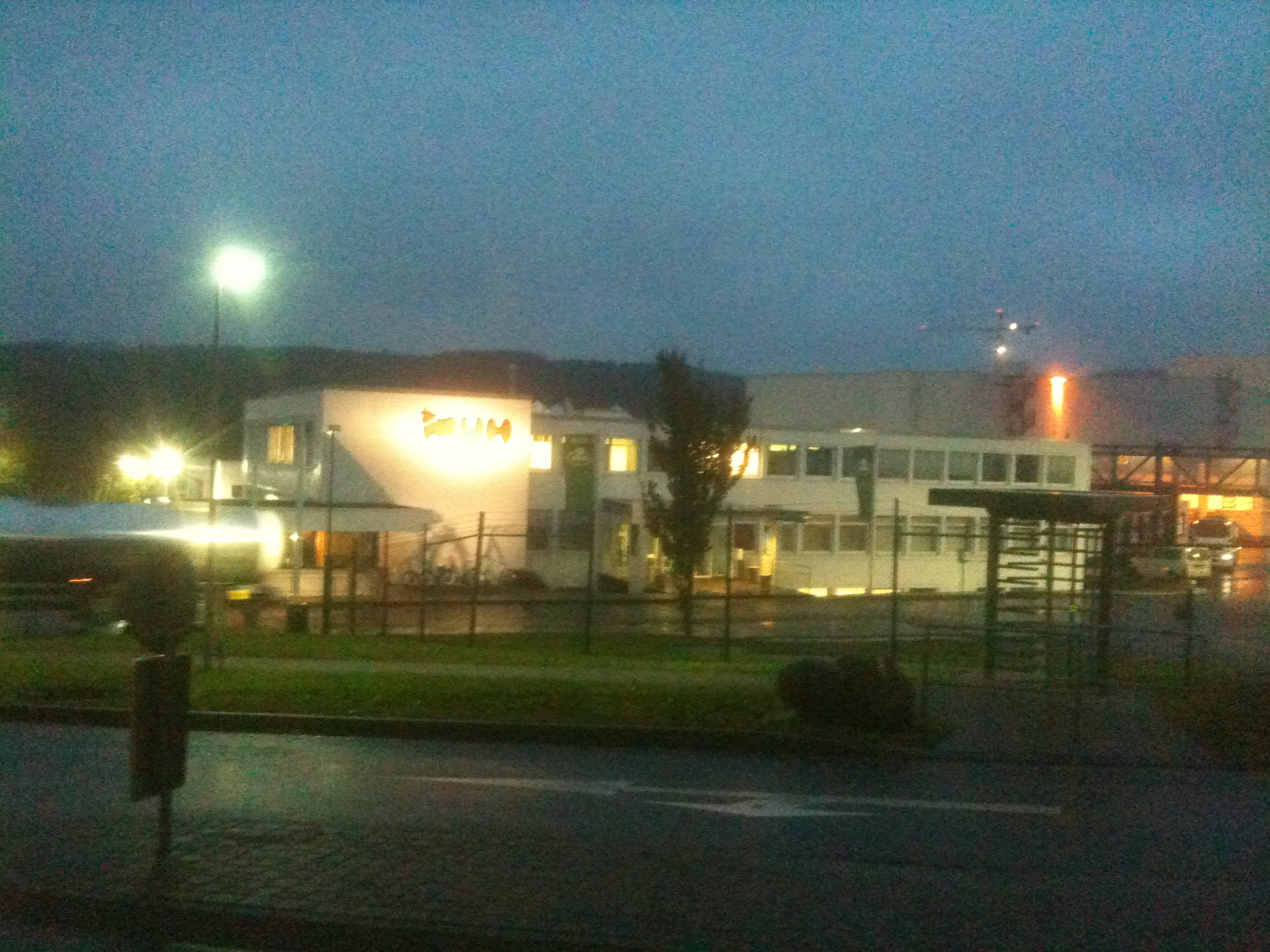 MUH in Pronsfeld